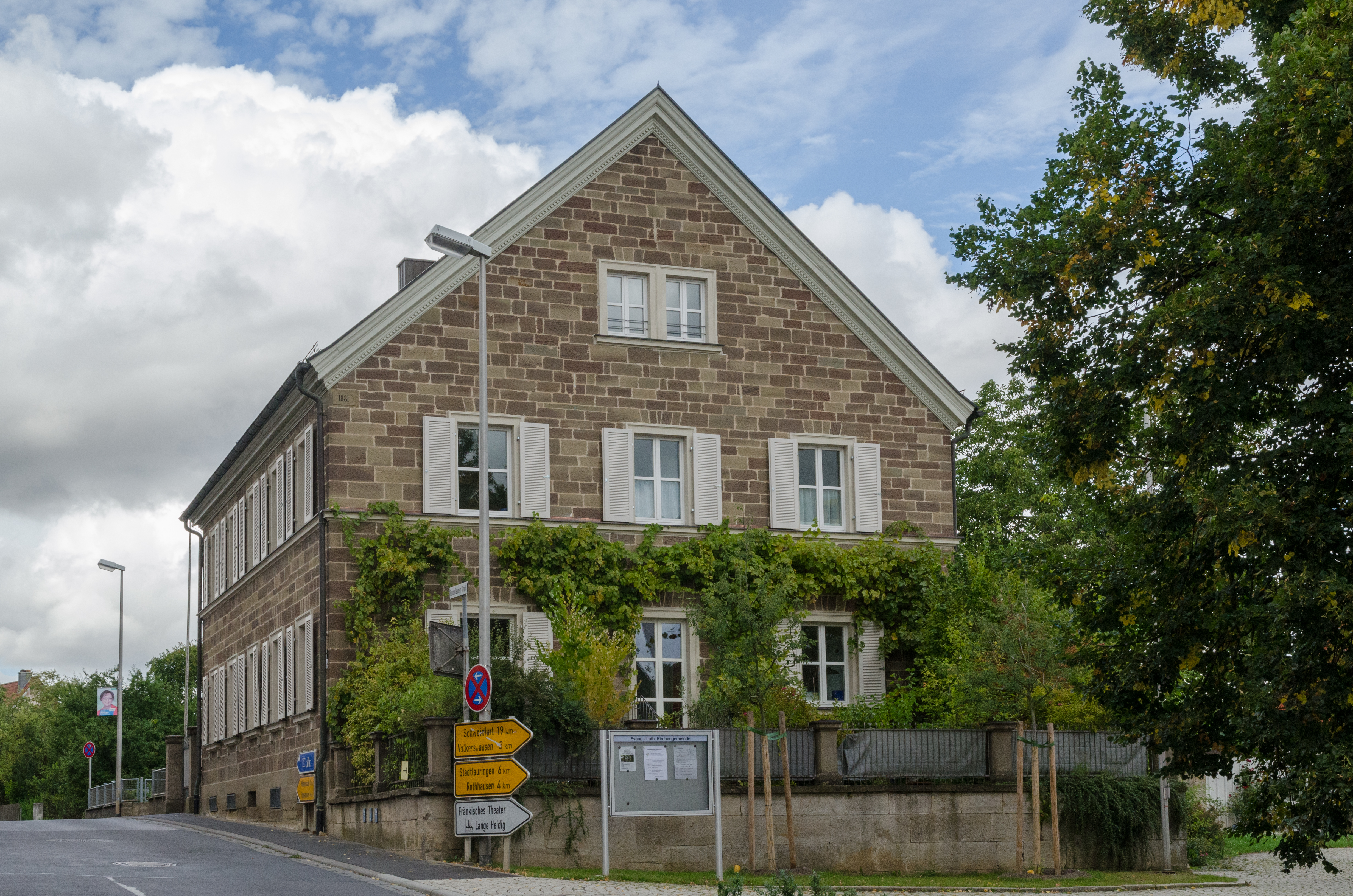 Maßbach, Ev. Pfarrhaus